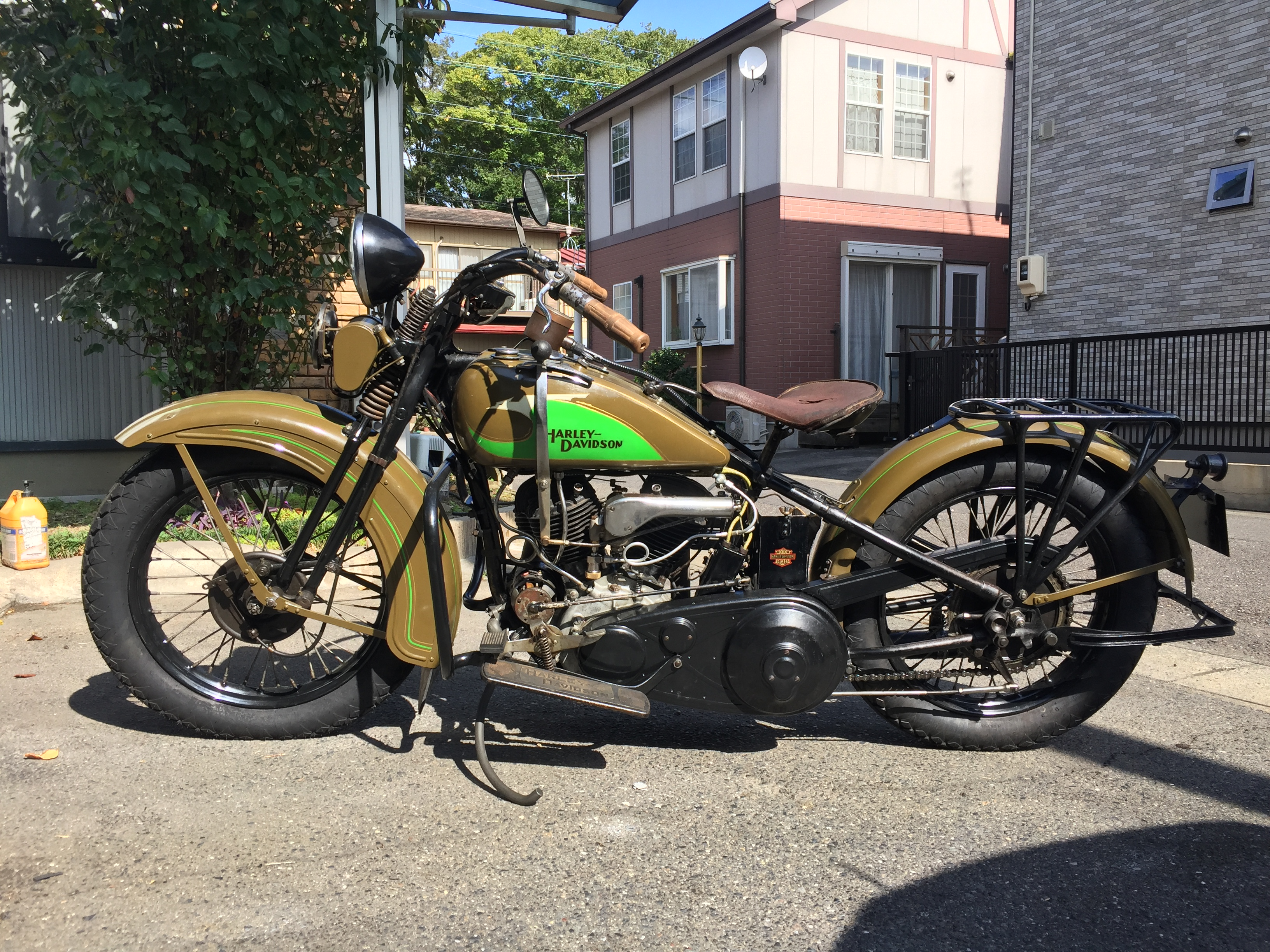 ハーレーダビッドソン 1933 VC 1200